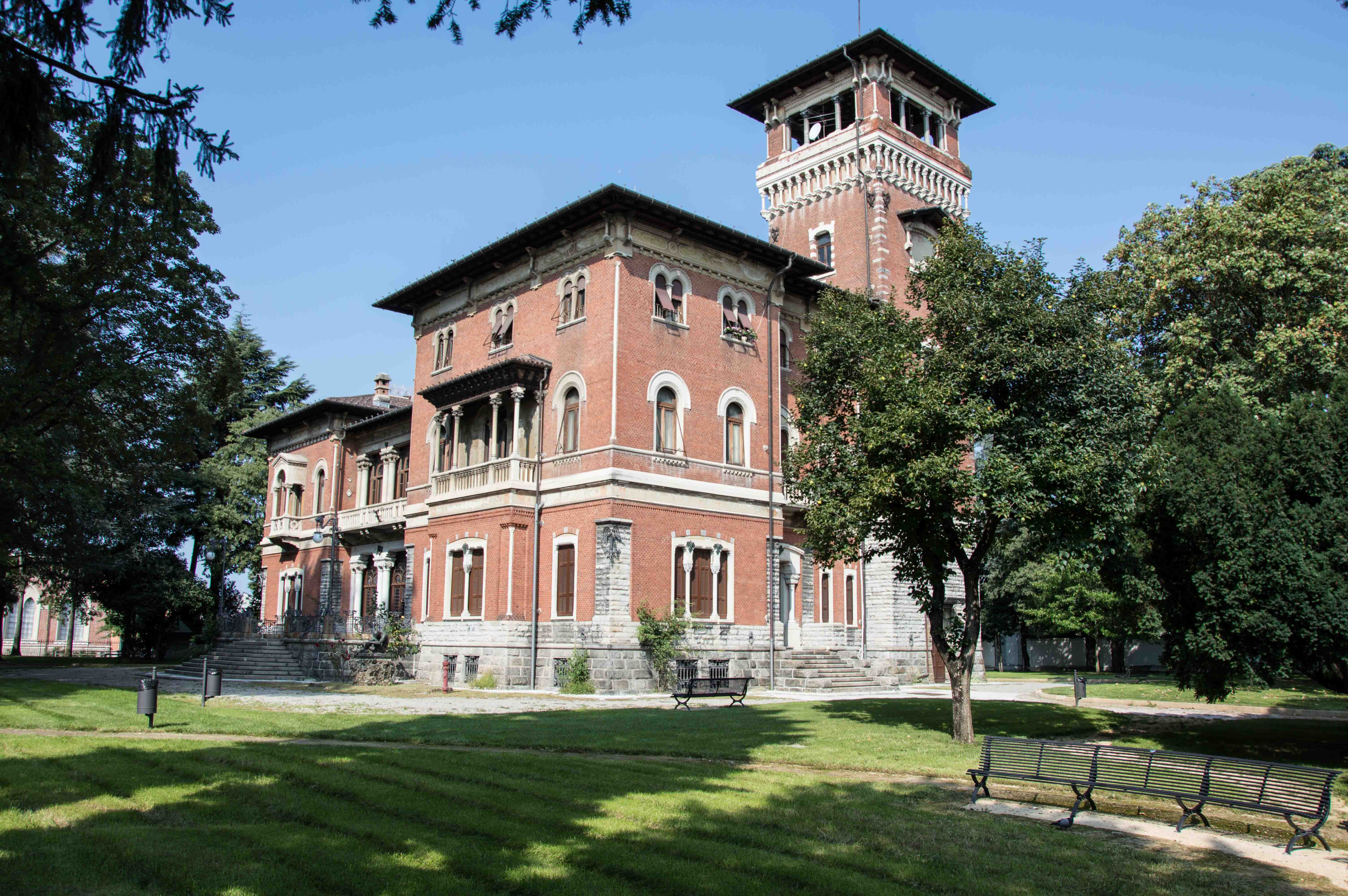 Villa Ottolini-Tosi This is a photo of a monument which is part of cultural heritage of Italy.